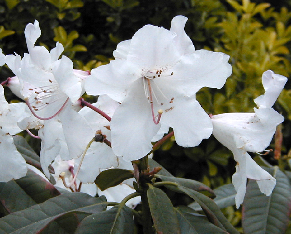 Rhododendron 'Loder's White'. Real Jardín Botánico de Madrid.